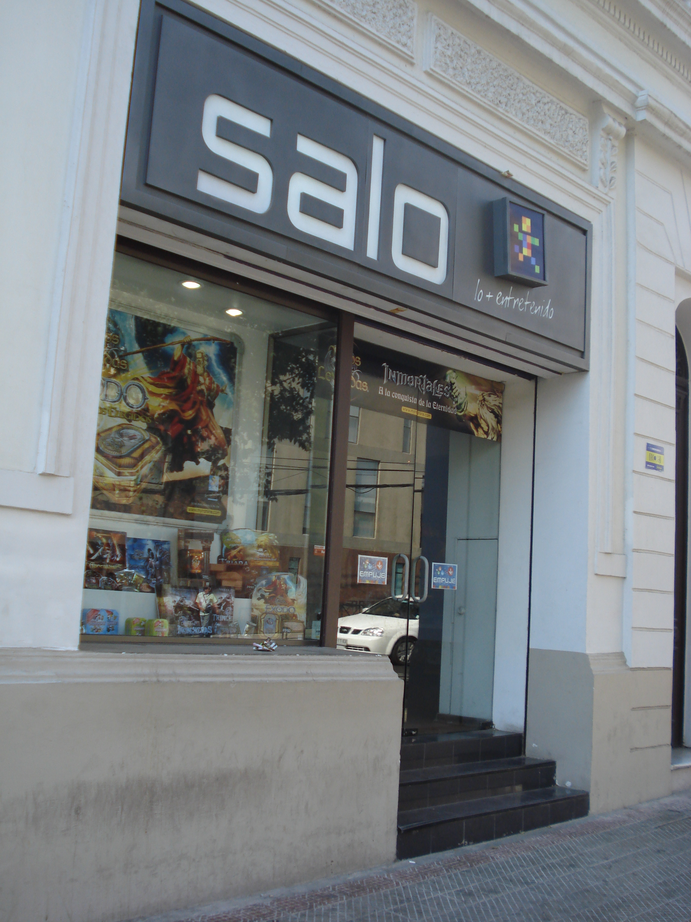 Tienda de la desaparecida editora chilena Salo.